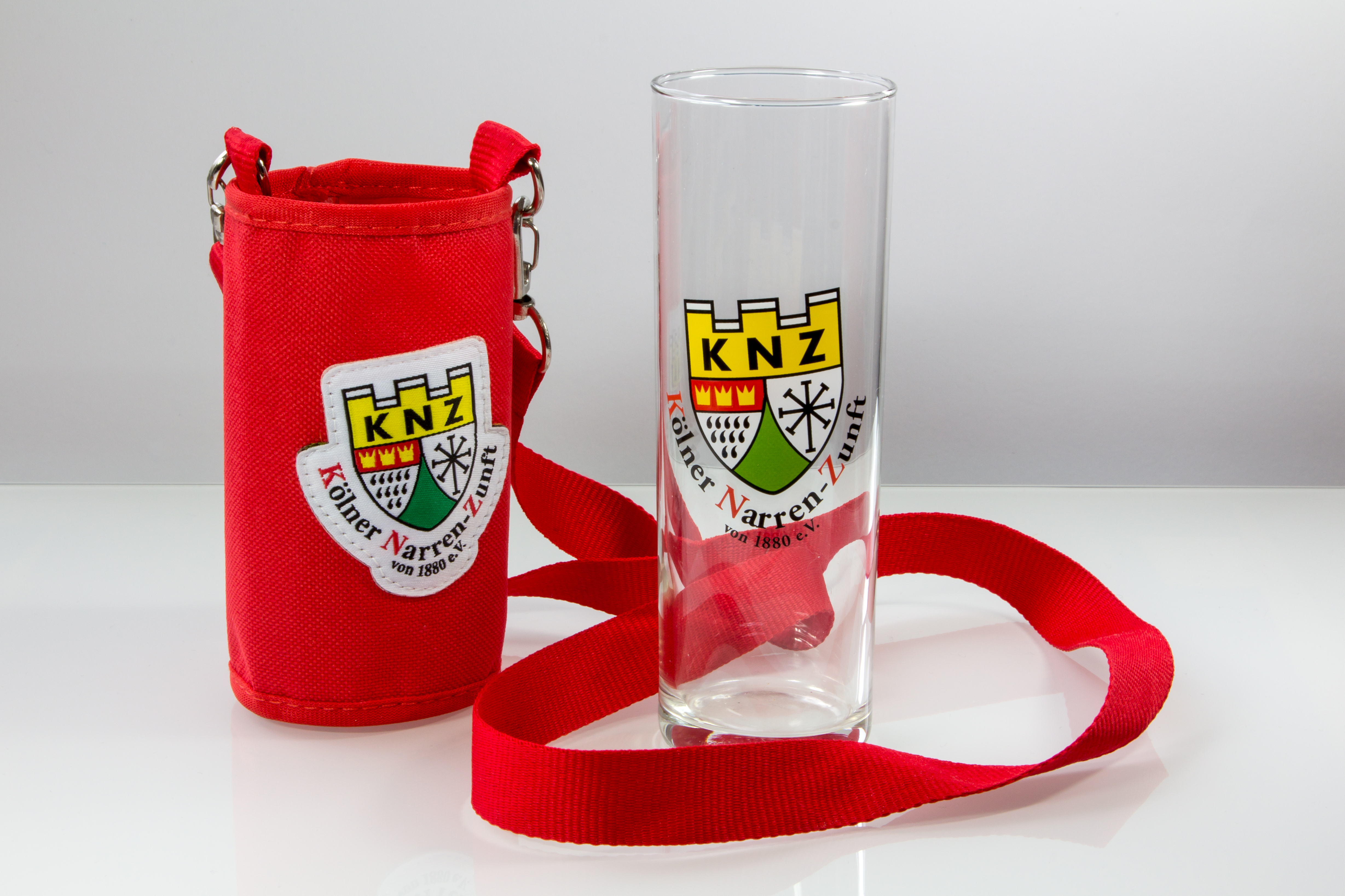 Kölschglashalter "Kölner Narren-Zunft"